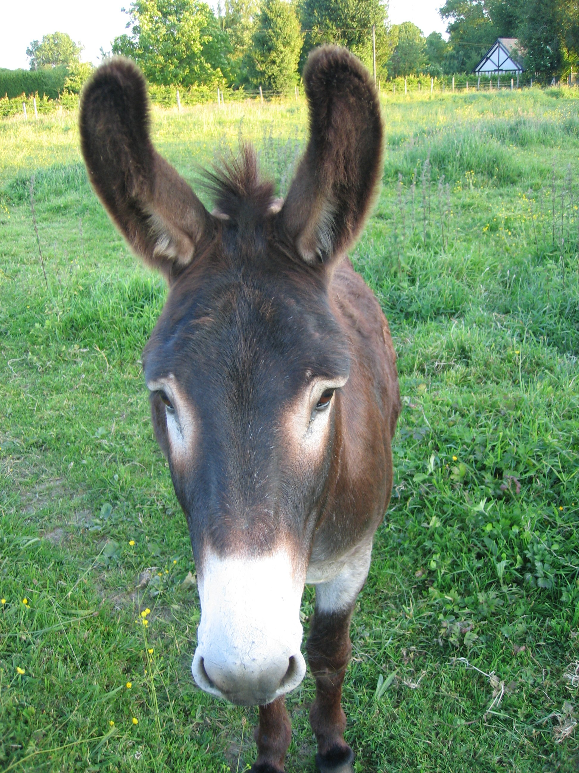 Equus asinus